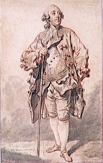 Louis Philippe d'Orléans (1725-1785)